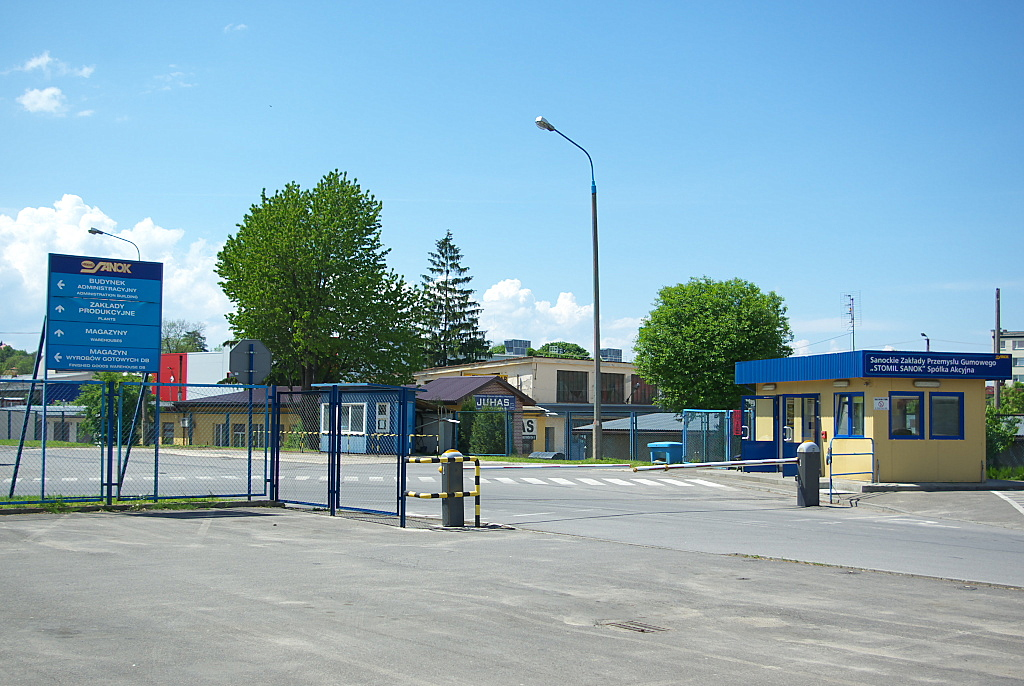 Brama Stomil Sanok Reymonta